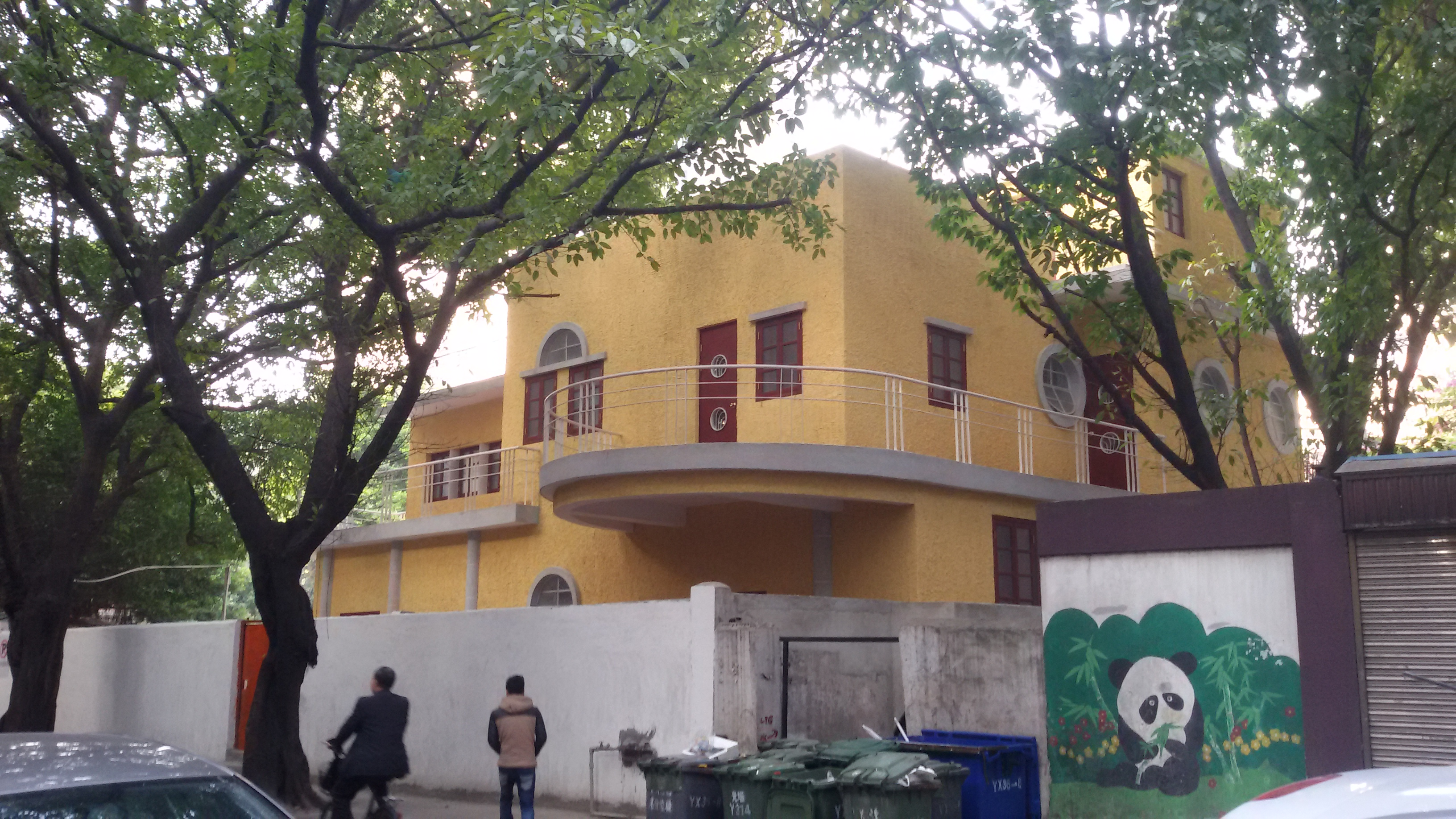 粵語: 金陵臺（後嚟新起返嗰間）